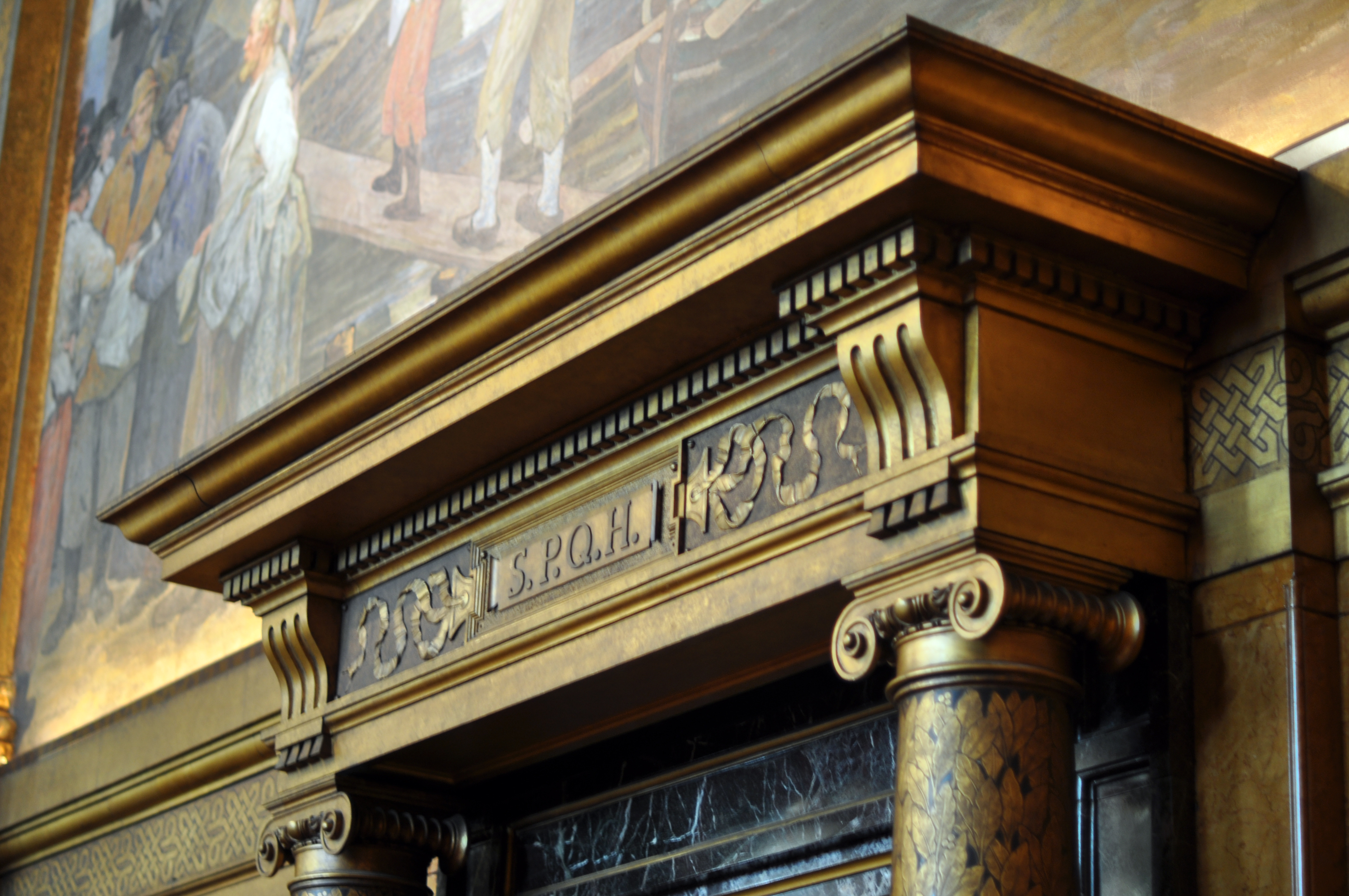 WikiProjekt Hamburgische Bürgerschaft 22./23. 6. 2011 Fotos aus dem Rathaus. Hier der Festsaal. Die Inschrift S.P.Q.H. über der Tür steht für "Senatus Populusque Hamburgensis" (=Senat und Bürgerschaft Hamburgs) und verweist damit auf das römische "S.P.Q.R." (Senatus Populusque Romanus). This is a photograph of an architectural monument.It is on the list of cultural monuments of Hamburg=Nummer=40